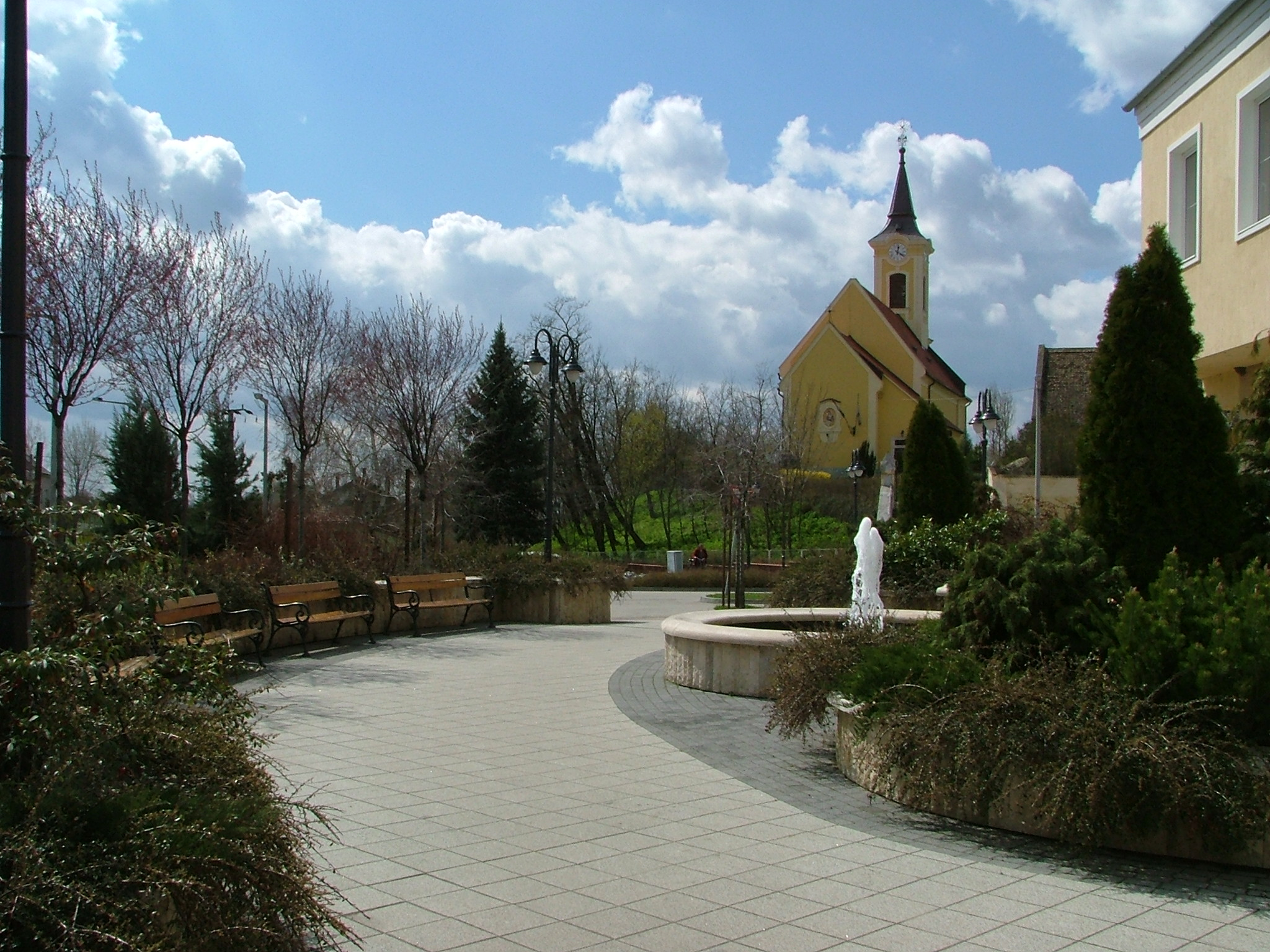 Nagyigmánd központja